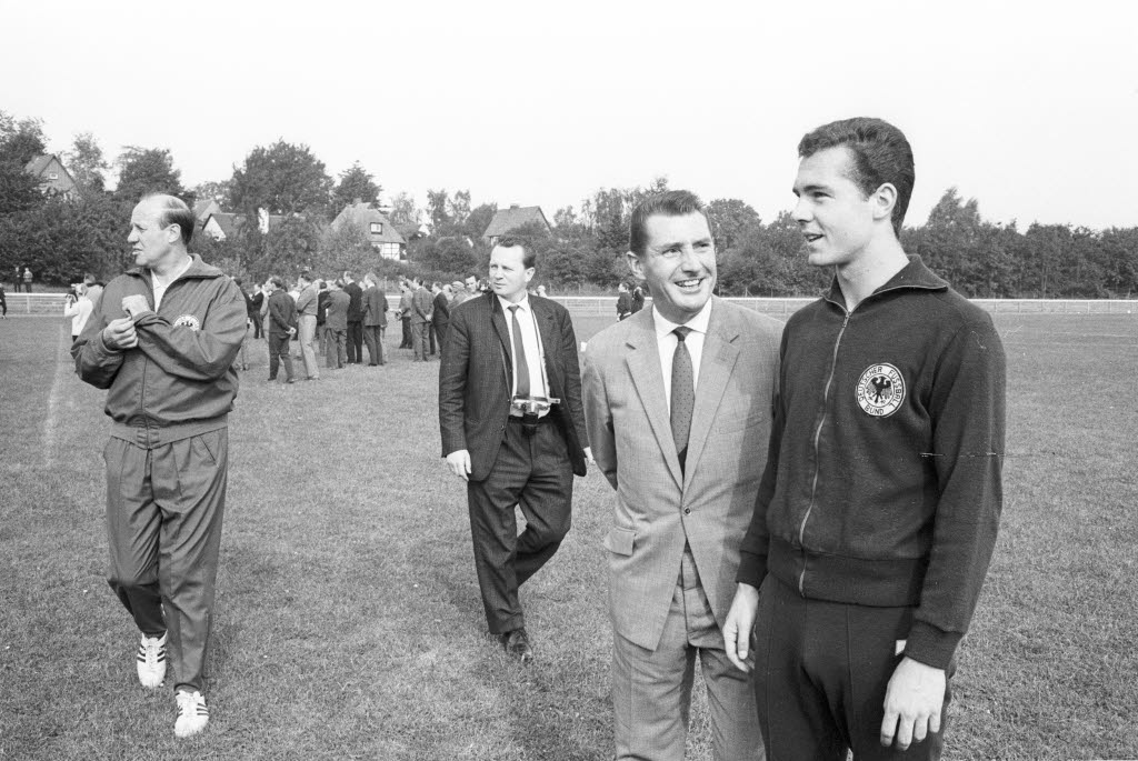 Nationaltrainer Helmut Schön (1.v.l.), Ehrenspielführer und Weltmeister von 1954 Fritz Walter (3.v.l.) und Franz Beckenbauer (4.v.l.).